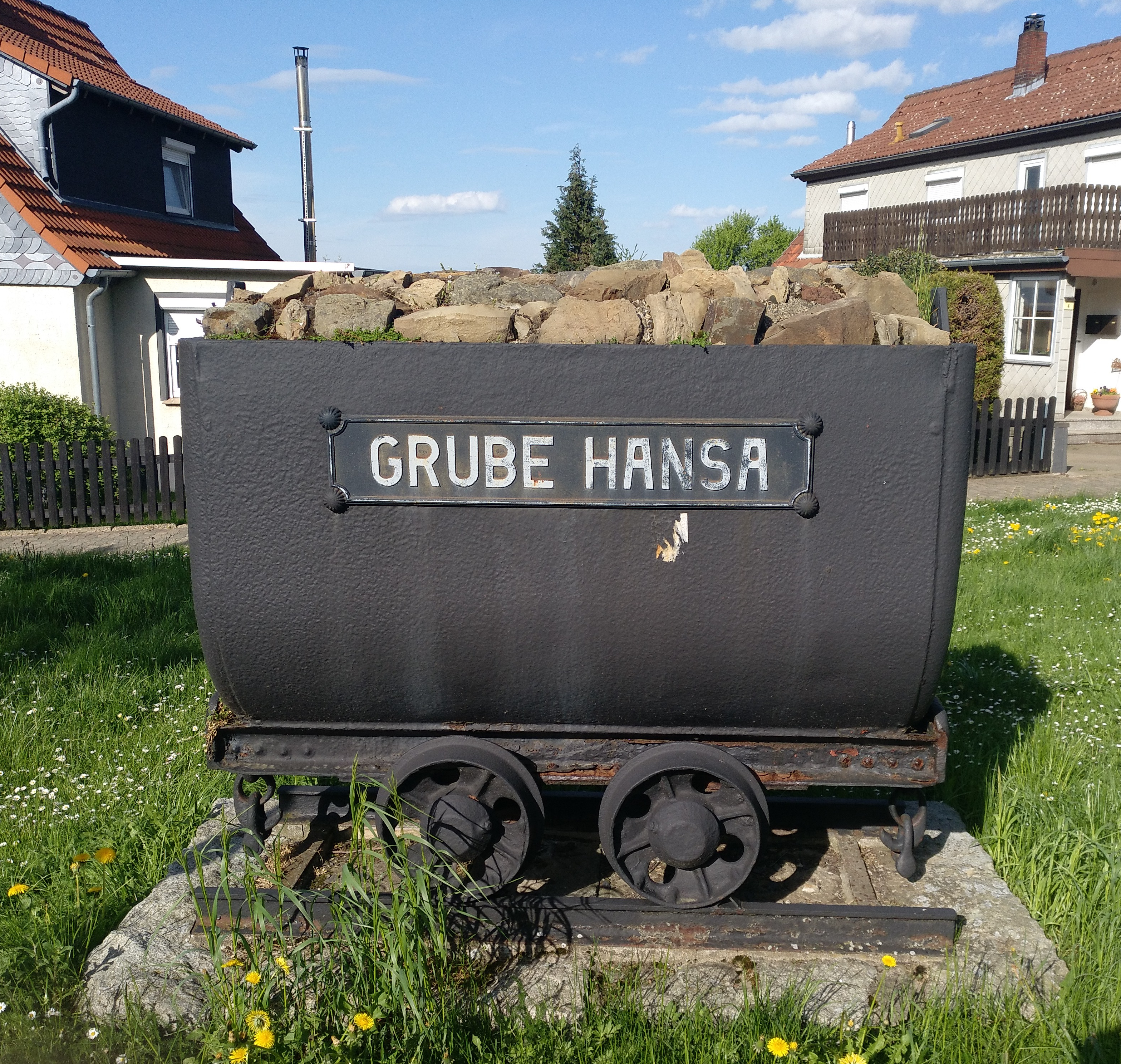 Gedenklore in Göttingerode an die 1960 geschlossene Grube Hansa.